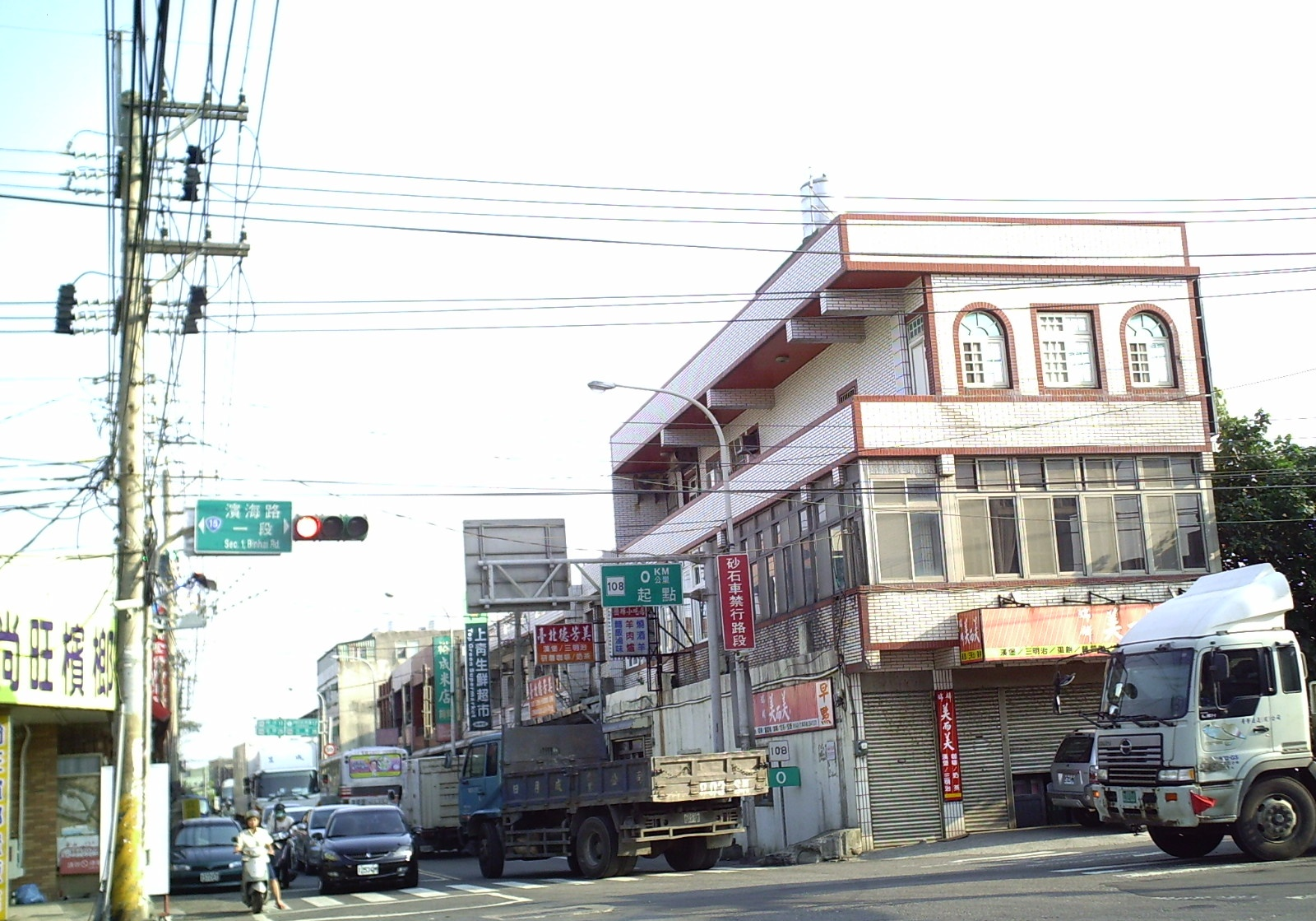 臺灣市道108號起點，位於桃園市蘆竹區台15線上。